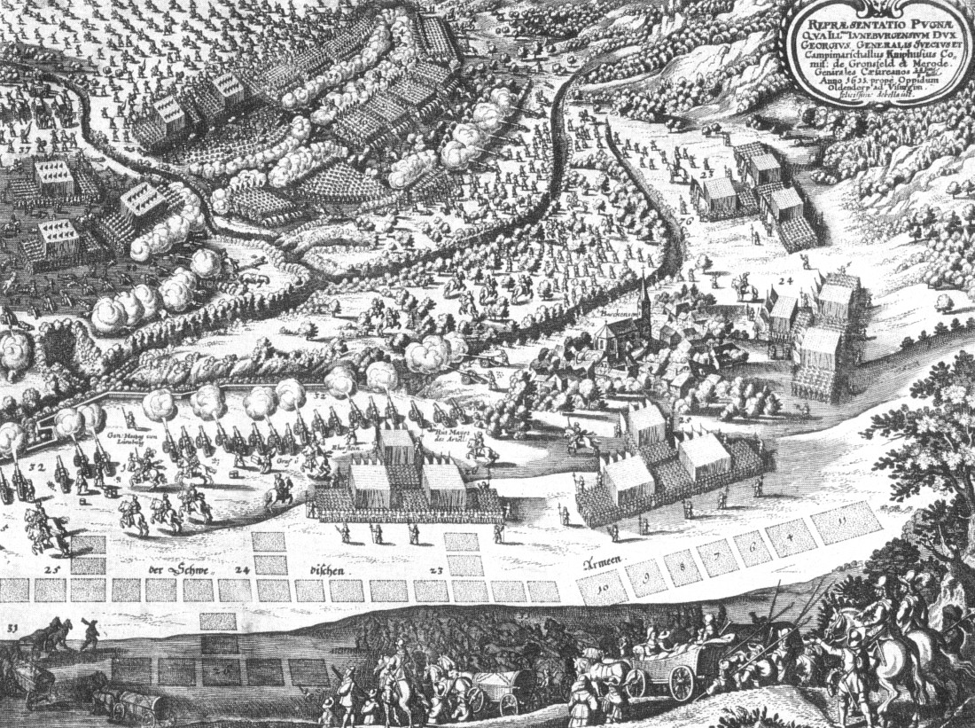 Schlacht bei Hessisch Oldendorf 1633 als Merian-Kupferstich 1644